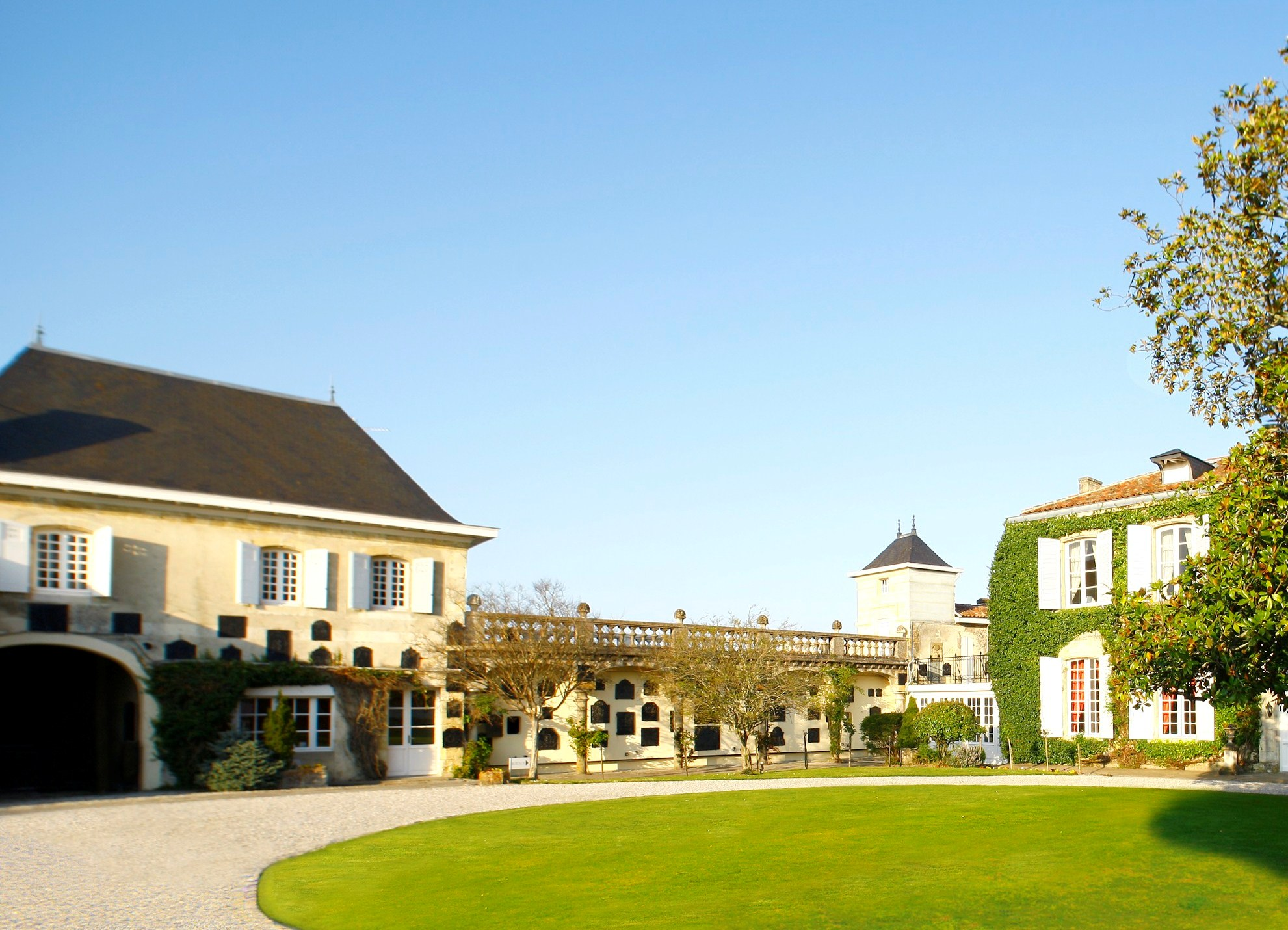 La cour du Château Prieuré-Lichine.